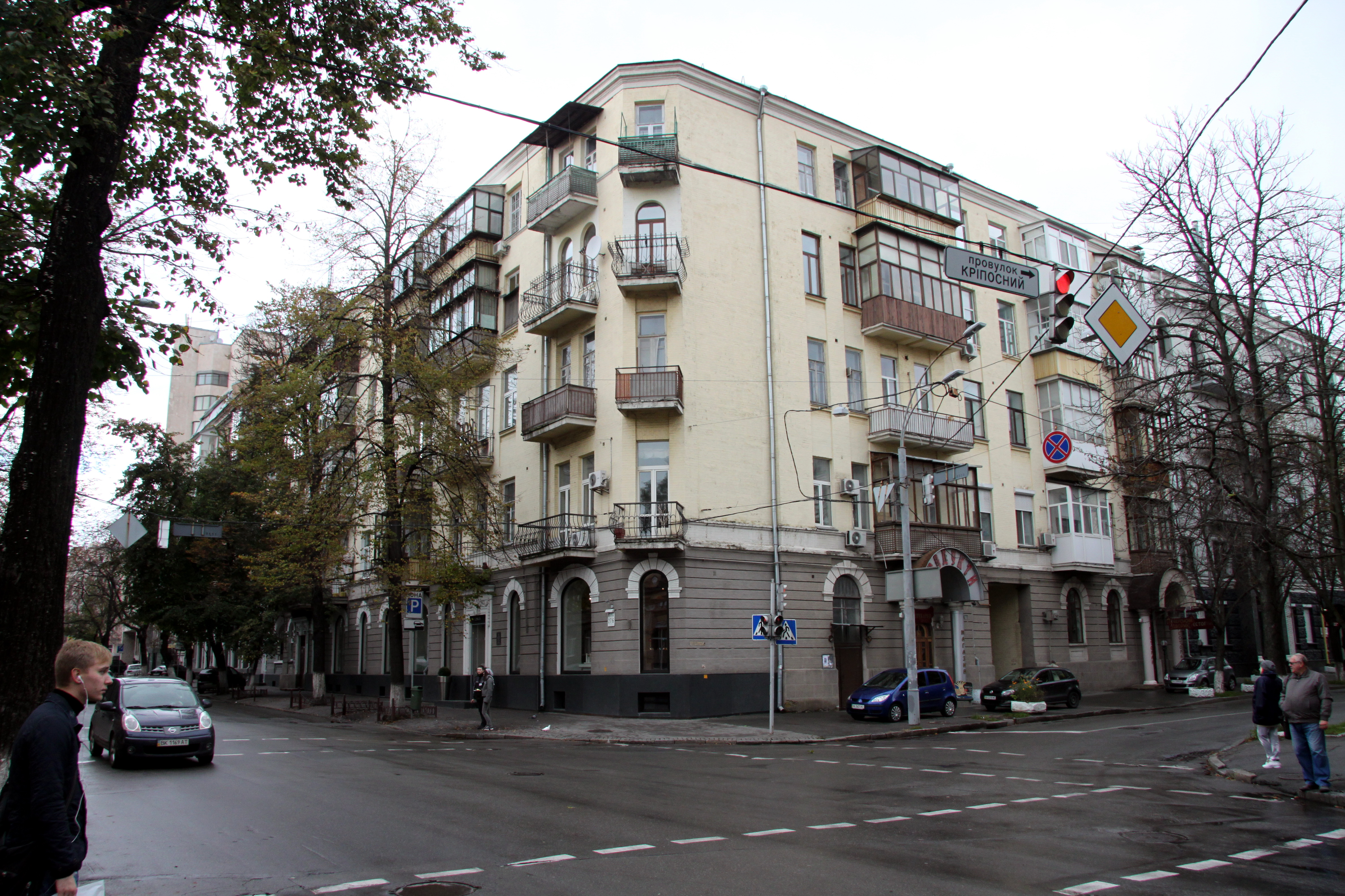 Будинок, в якому у 1912–1924 рр. проживала родина Лучицьких, істориків, літераторів; Лічков Л. С., статистик, літератор, співробітник «Киевской старины», Київ, Інститутська вул., 27/6